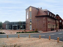 Haupstelle in Lathen